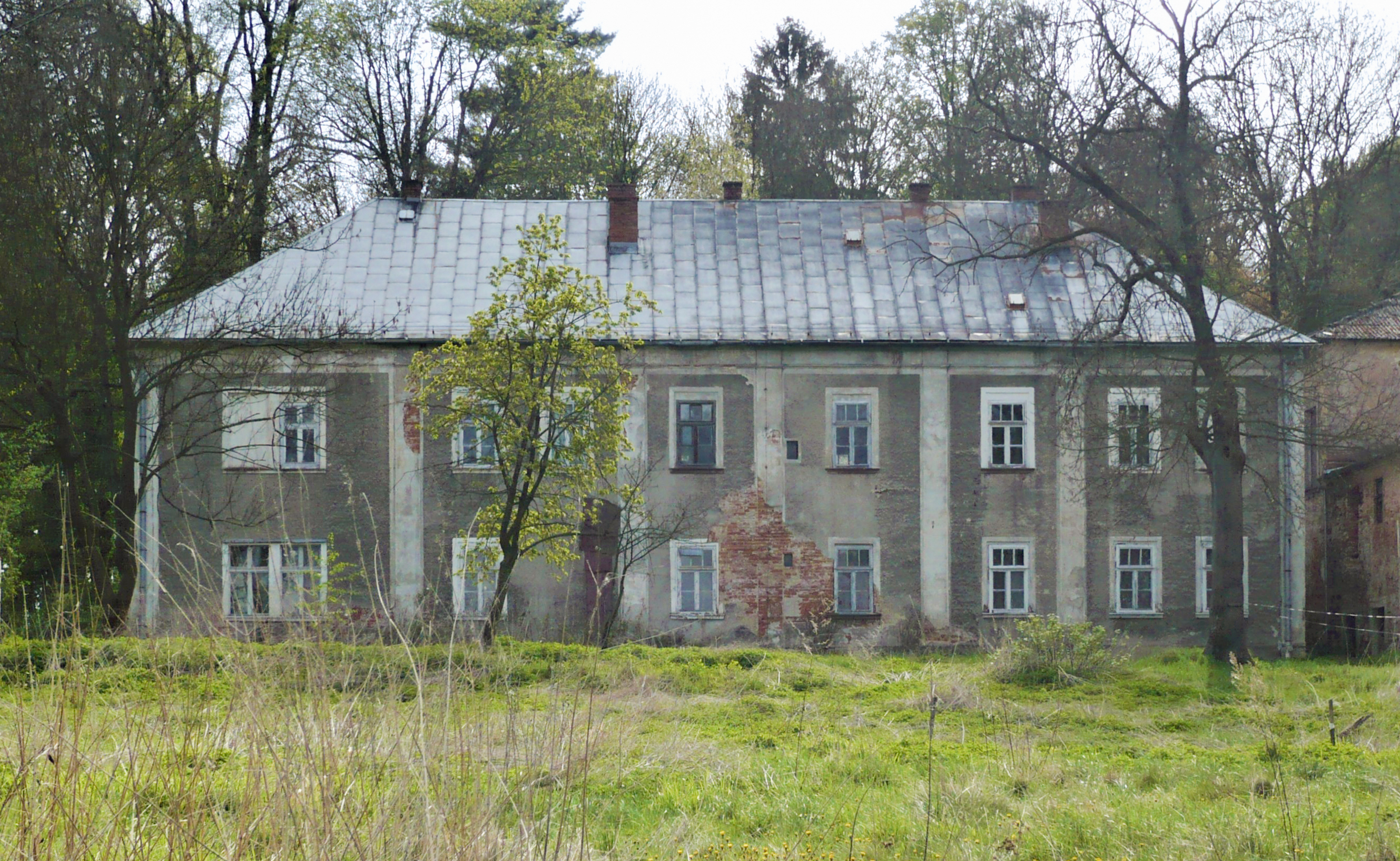 Pałac w Korytowie